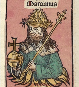 Imagem de Marciano na Crônica de Nurembergue